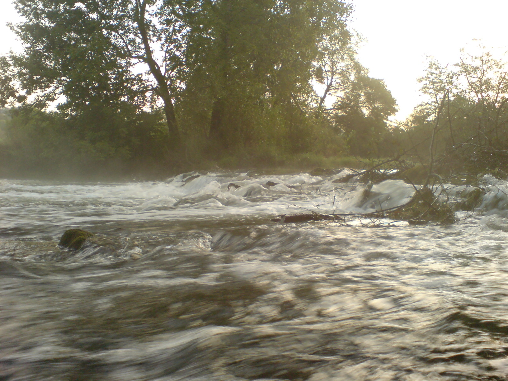 Die Jagst. Aufnahme Ende September bei Niedrigwasser unterhalb von Widdern morgens etwa zur Sonnenaufgangszeit.